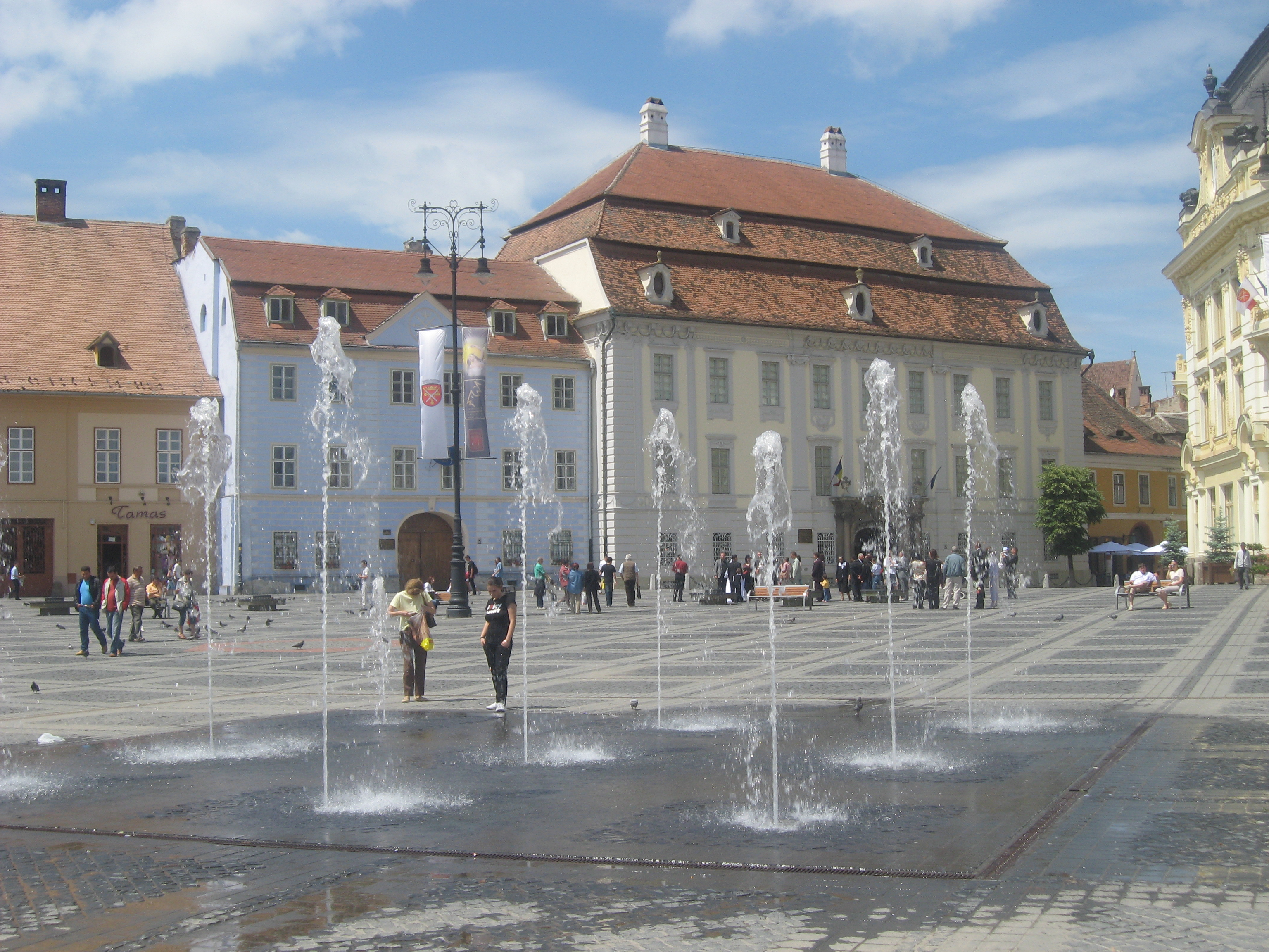 Palatul Brukenthal, azi Muzeul Brukenthal